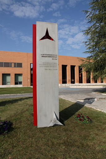 Monumento/memorial a las Brigadas Internacionales situado en la Ciudad Universitaria de Madrid (España)